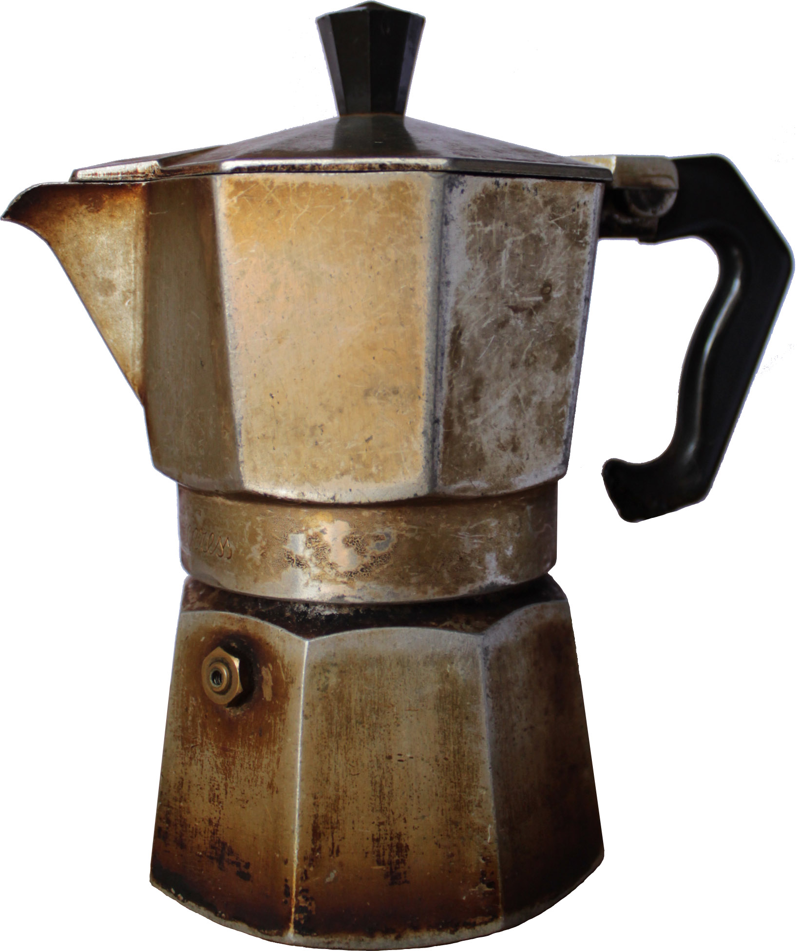 Original Italian Moka Bialetti model "Moka Express"